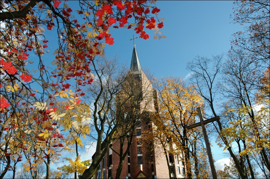 Olecko, Plac Wolności 18 - rzymskokatolicki kościół parafialny p.w. Niepokalanego Poczęcia NMP